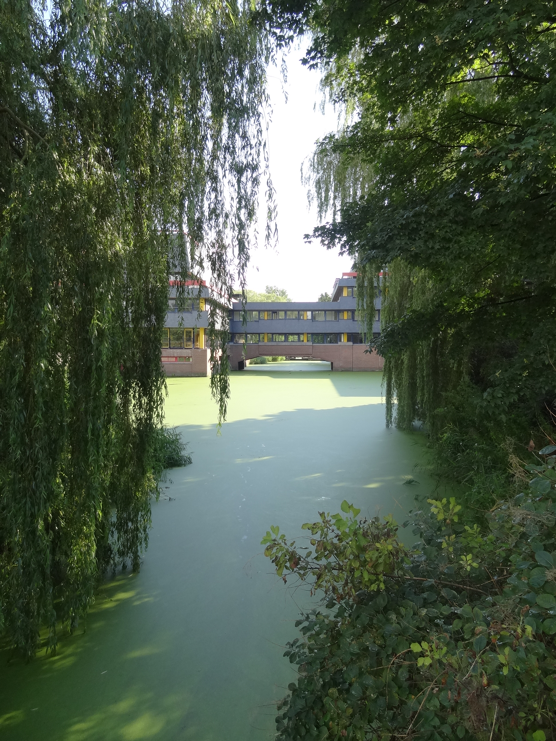 De Groene Wijzend is een riviertje die tot de jaren 1970 de grens vormde tussen Zwaag en Hoorn. Na het samenvoegen van de twee gemeenten is hierboven het nieuwe Stadhuis gebouwd met een brug die de grens overspant.